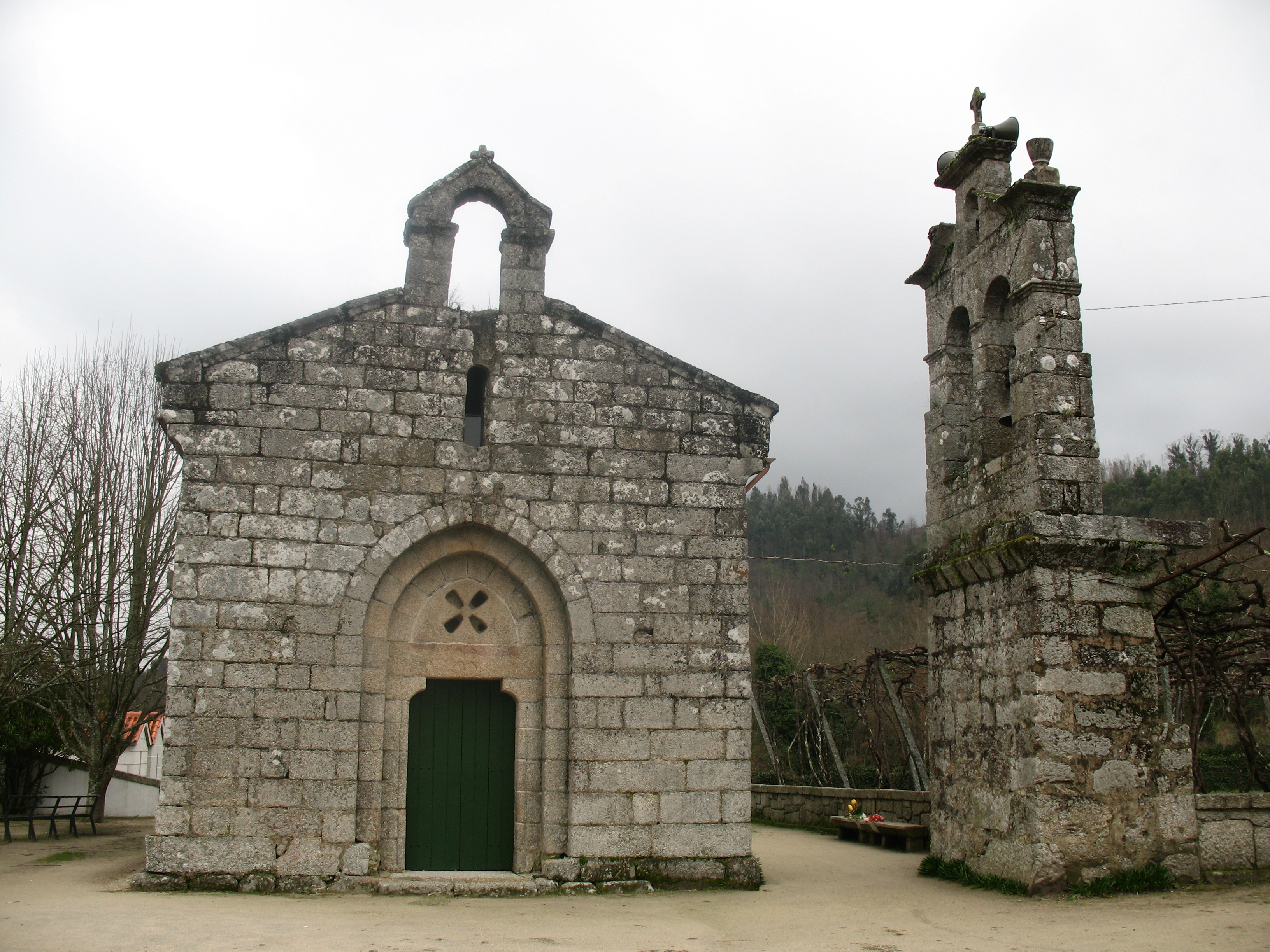 Amarante Igreja Românica de Jazente